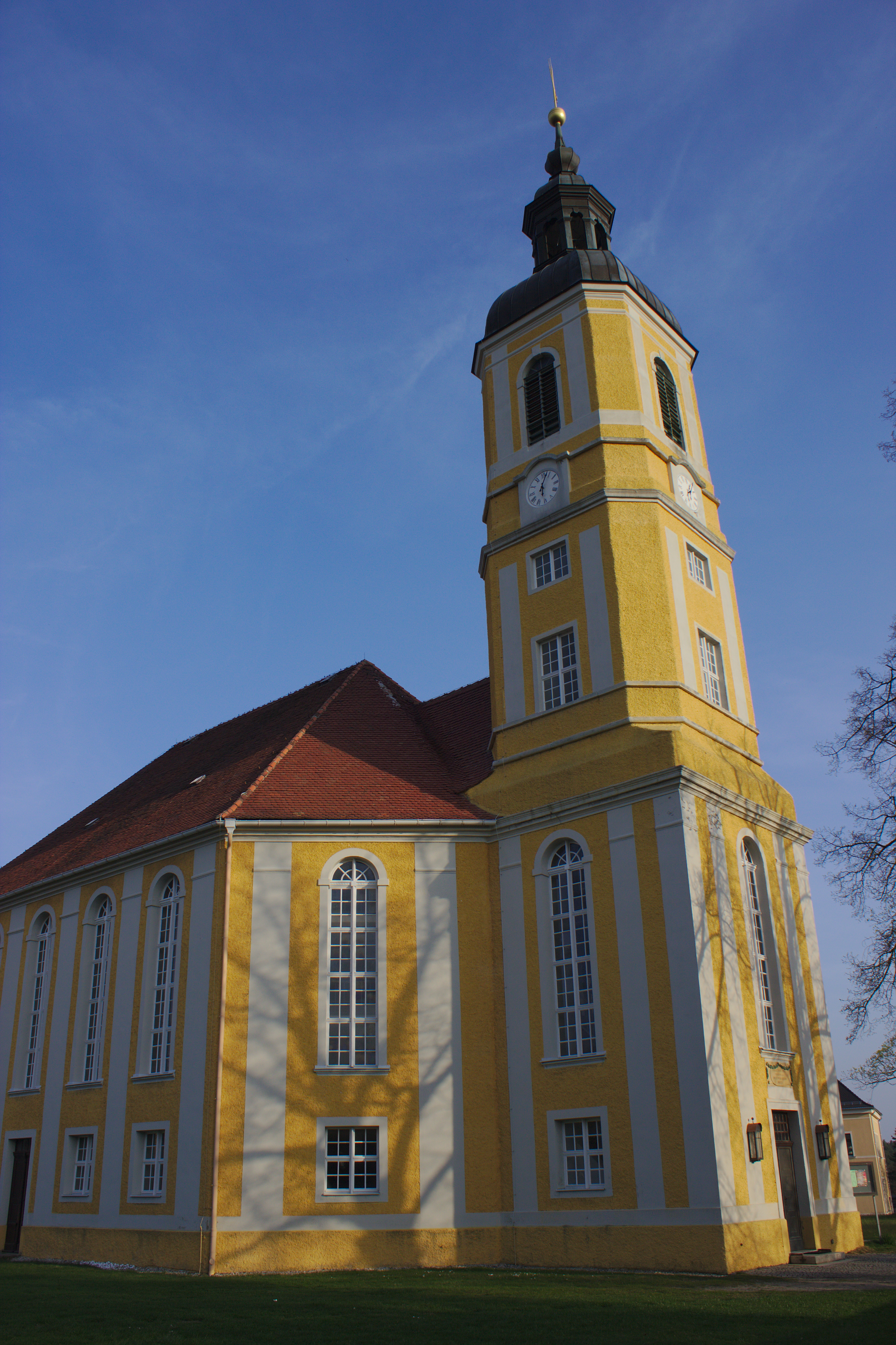 Hornjoserbsce: Wóslinčanska ewangelska cyrkej.